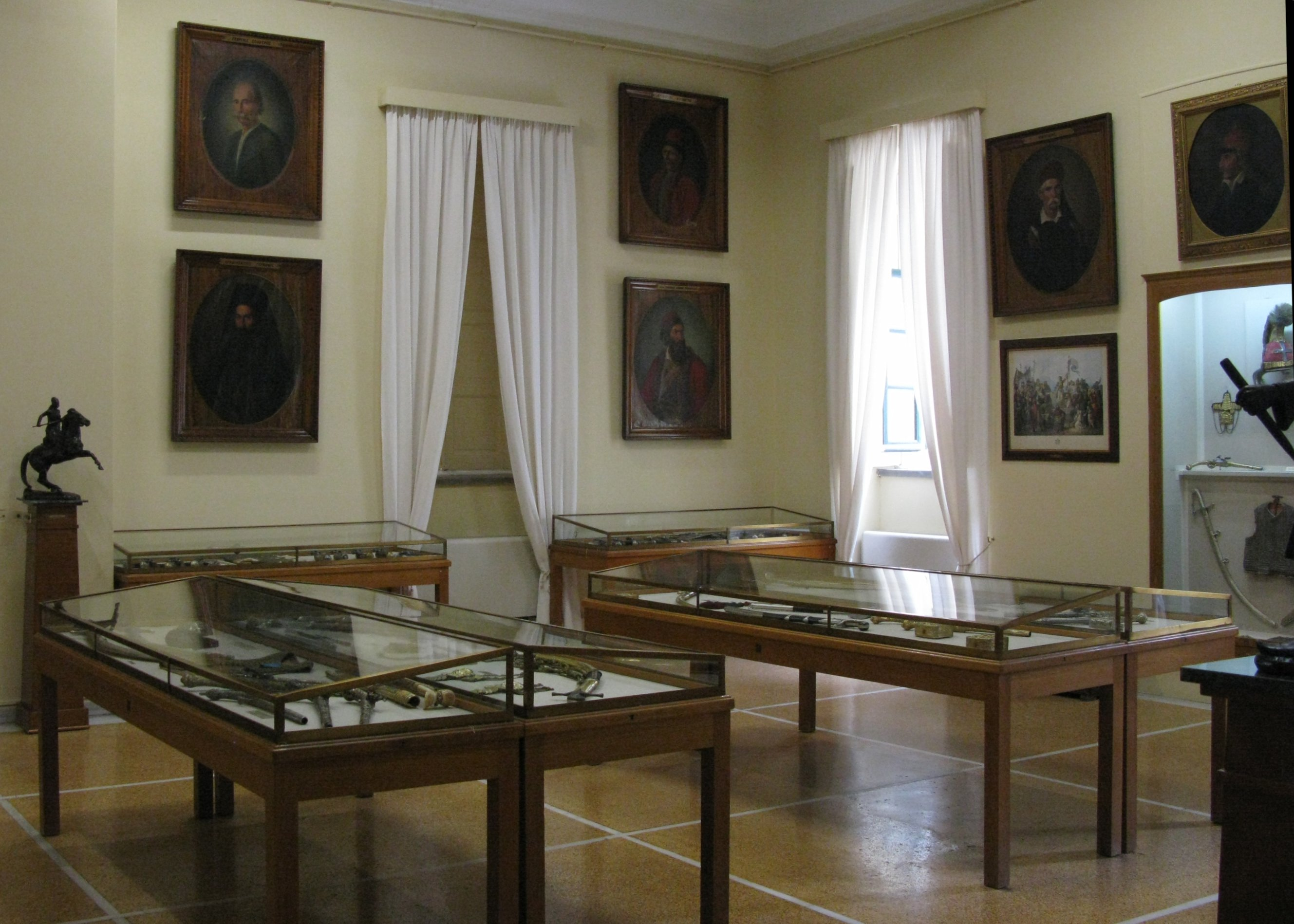 Εθνικό Ιστορικό Μουσείο. Αθήνα.